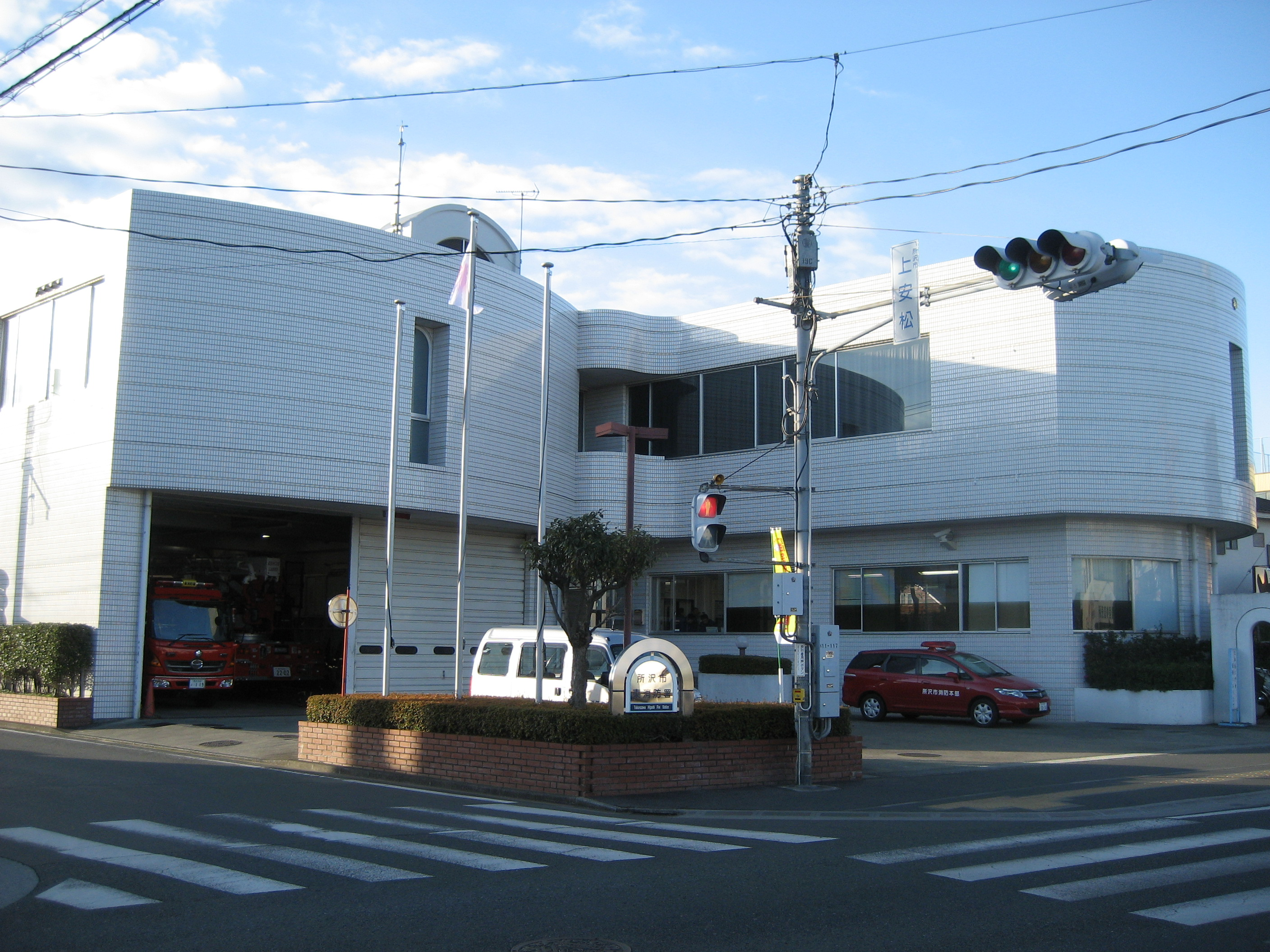 所沢市消防本部東消防署庁舎 - 上安松交差点